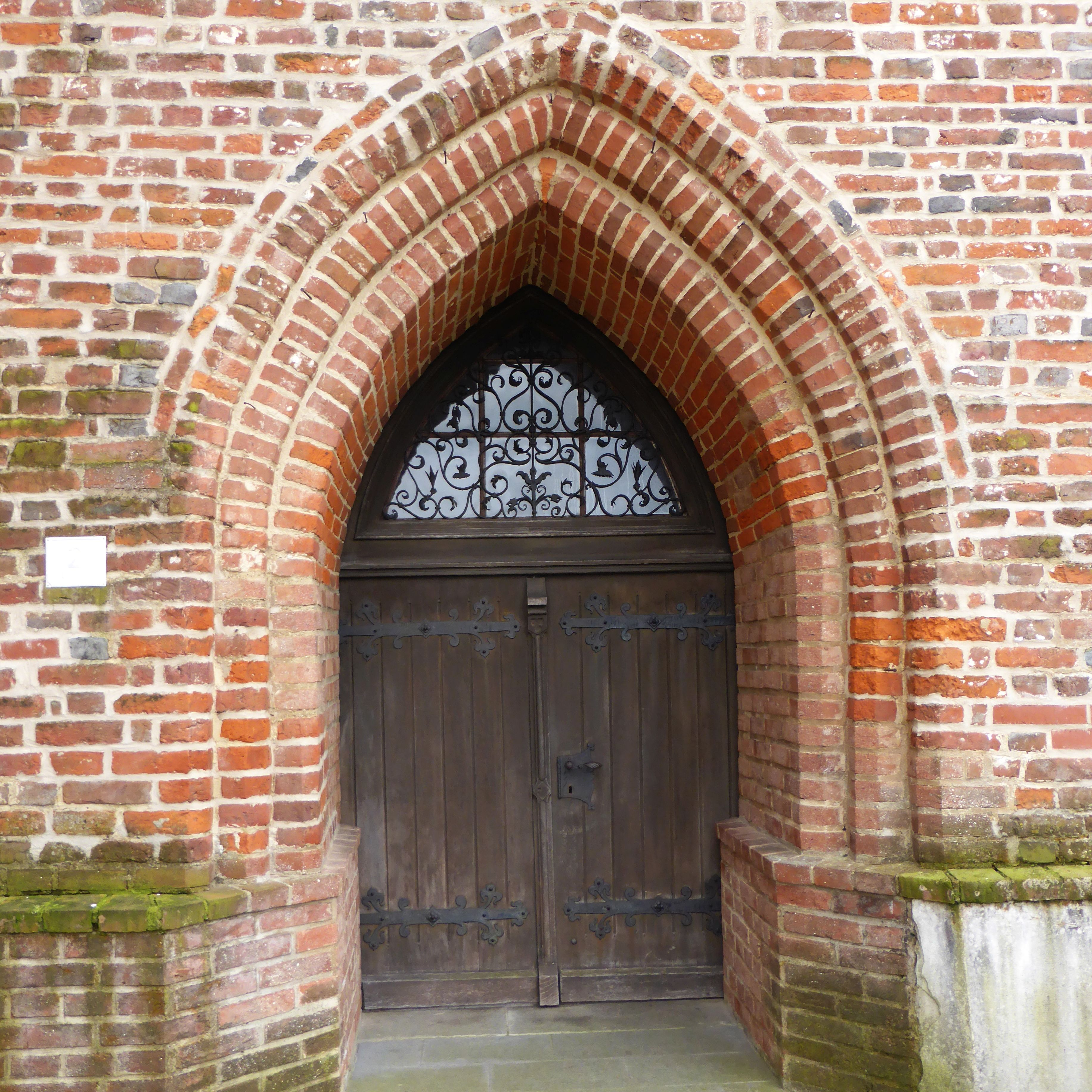 Oberdietfurt (Pfarrkirche St. Johannes der Täufer)